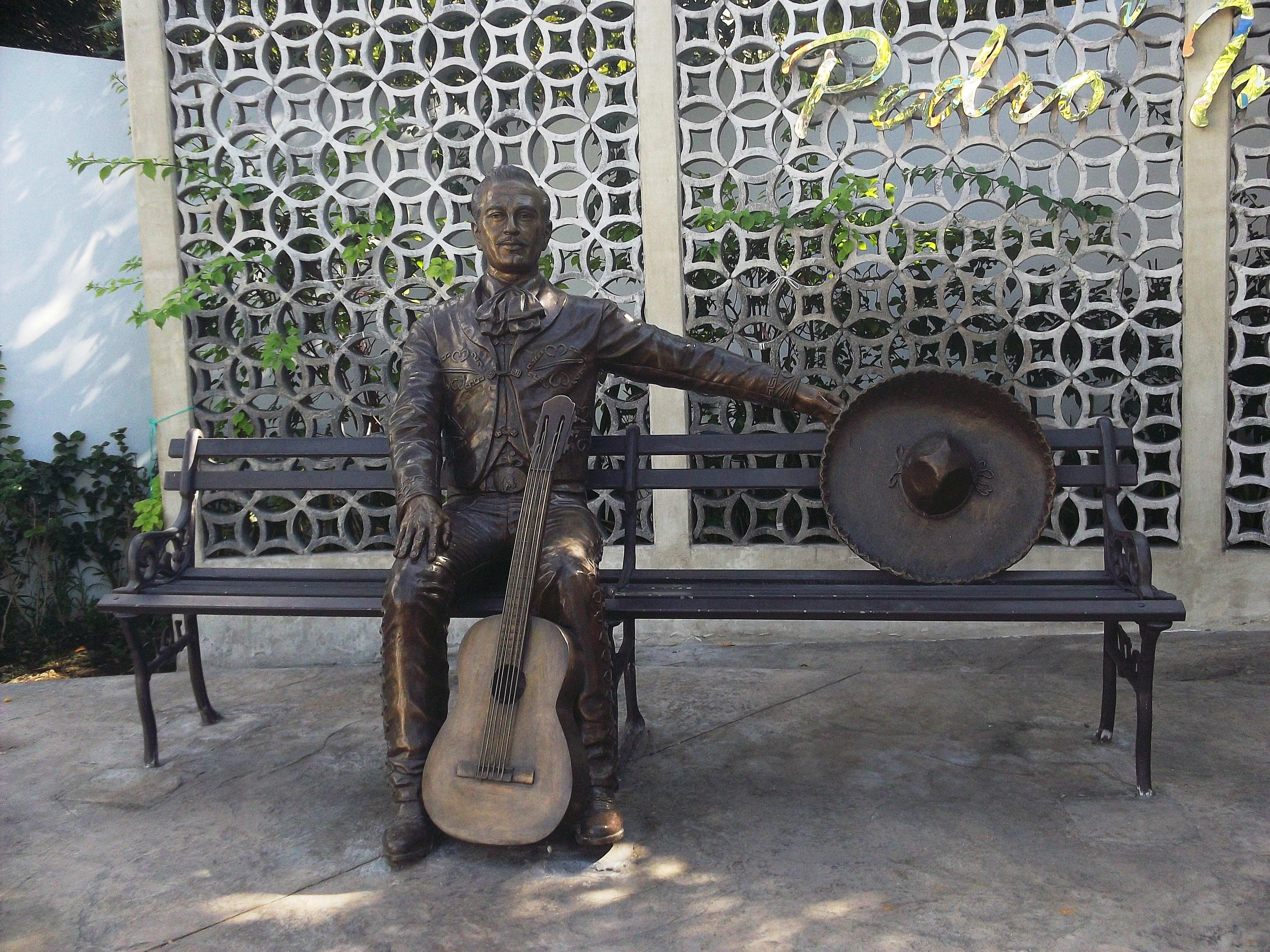 Estatua del Parque Pedro Infante en Mérida, Yucatán.